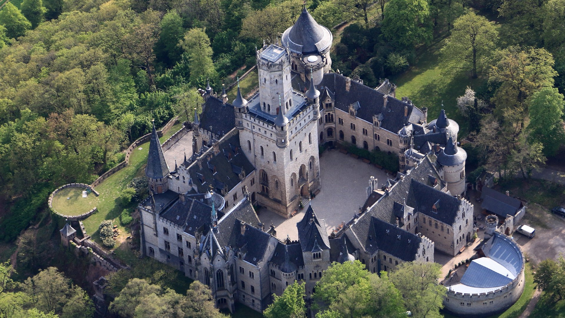 Luftaufnahme Schloss Marienburg